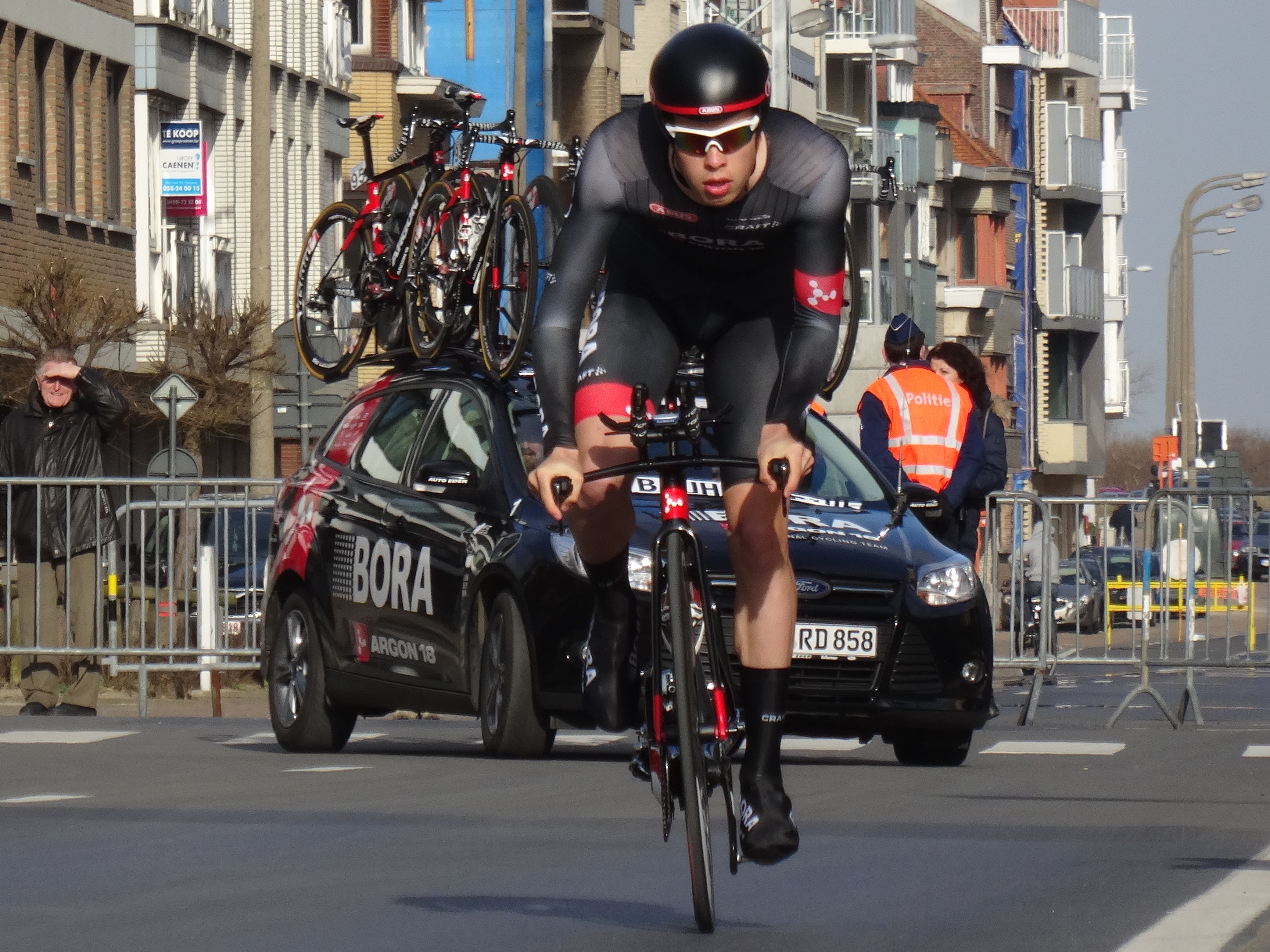 Reportage réalisé le vendredi 6 mars à l'occasion du contre-la-montre individuel du prologue des Trois jours de Flandre-Occidentale 2015 à Middelkerke, Belgique.